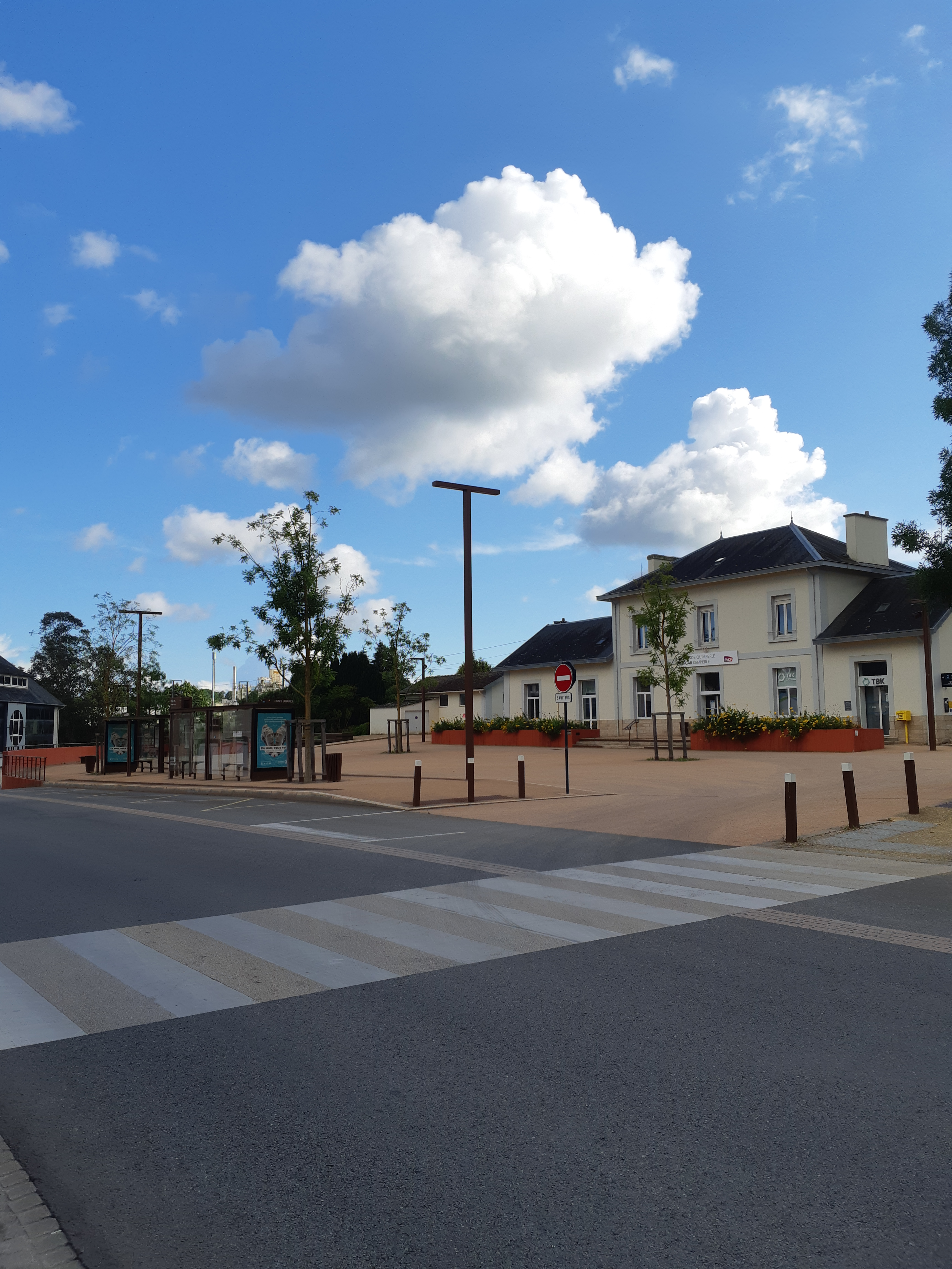 Image du point d'échange multimodal de Quimperlé côté gare de voyageurs SNCF, avec la quai urbain à gauche